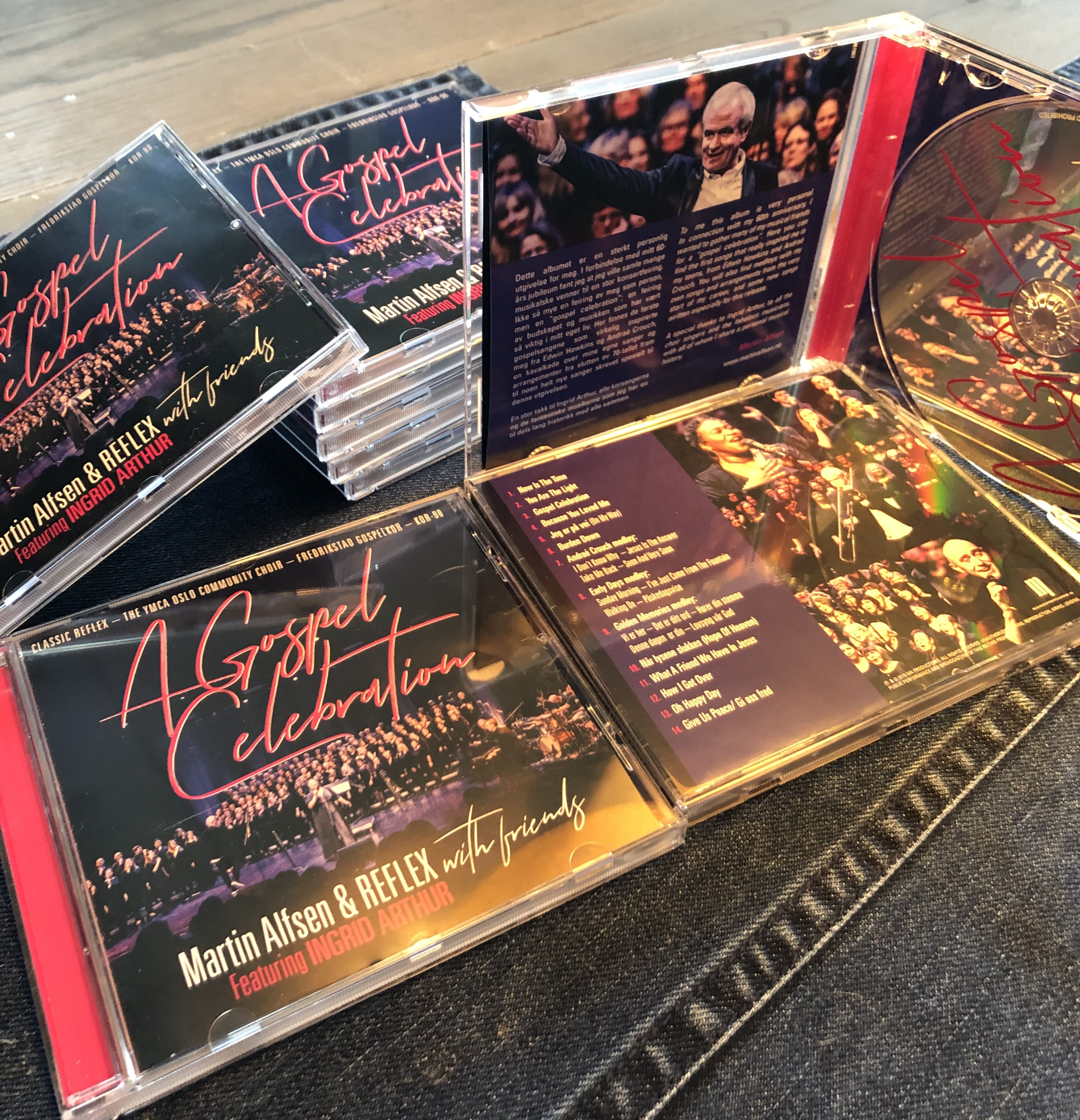 Coverbilde til siste album A Gospel Celebration